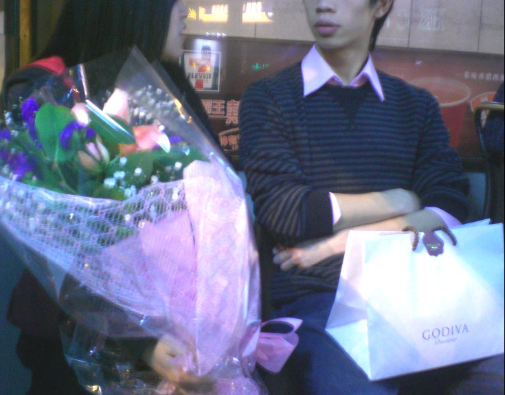 情人節約會 Dating @ Valentine's Day 2009